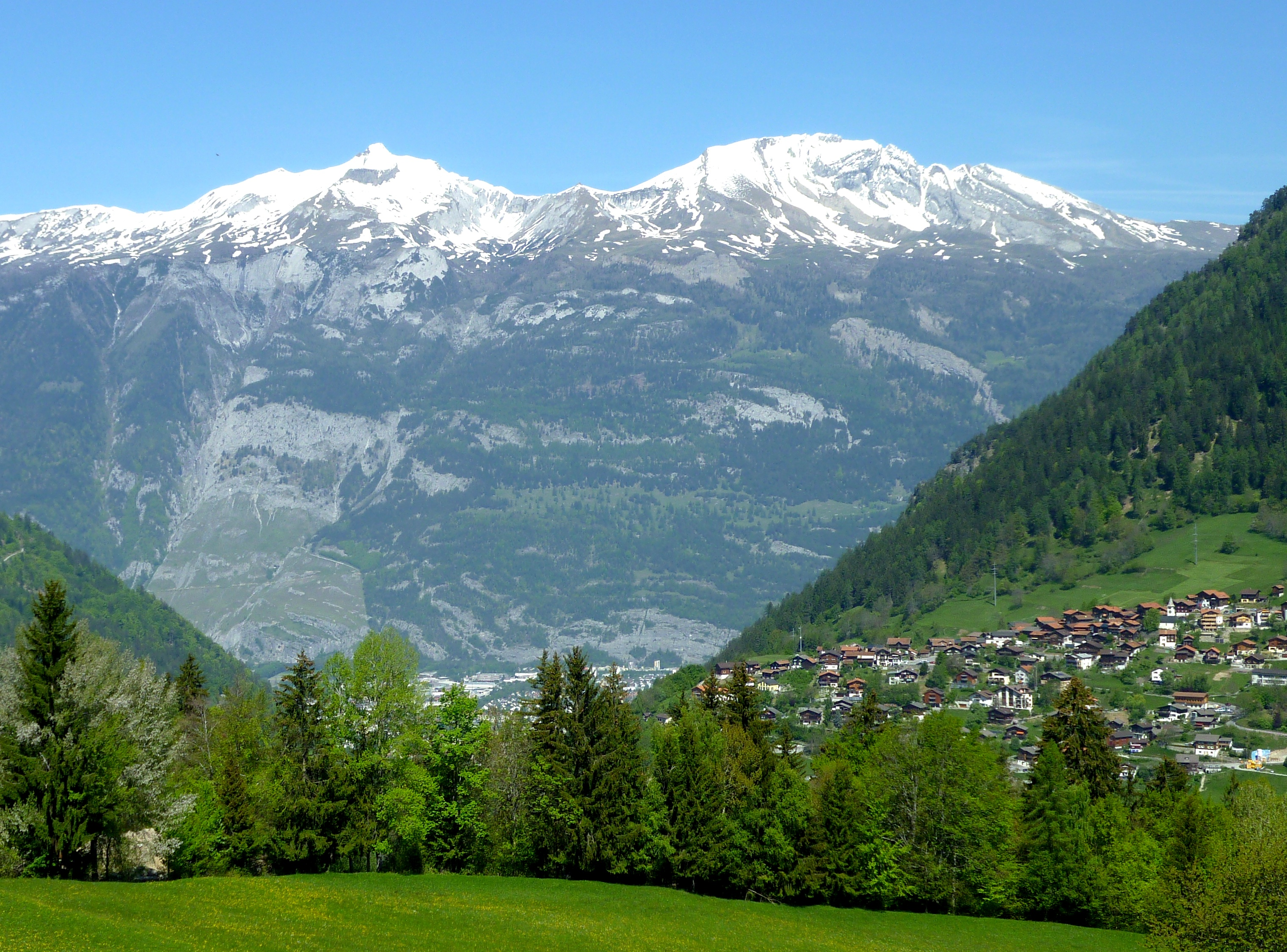 rechts Maladers, im Hintergrund der Calanda